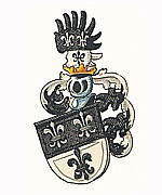 Wappen der Muntprat. Geteilt von Schwarz und Silber, drei Lilien (2, 1) in gewechselten Farben.